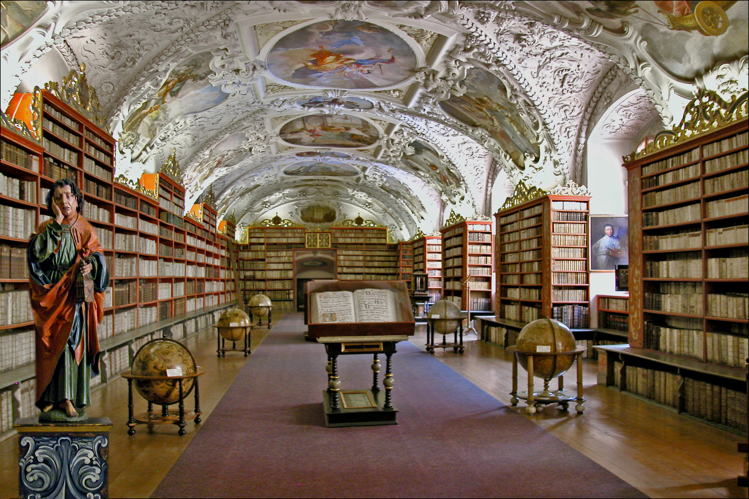 La salle de théologie du couvent de Strahov (Prague) a été réalisée entre 1671 et 1679. Encadrées de stucs, les peintures du plafond ont été réalisées vers 1720, elles déclinent le thème de la Vraie Sagesse. La bibliothèque de Strahov est l'une des plus belles bibliothèques historiques d'Europe. Elle possède une grande pureté stylistique du haut baroque. Les fonds anciens (130 000 volumes) sont dans les salles de théologie et de philosophie et dans le couloir qui mène à ces salles. Site de l'auteur sur la Tchéquie